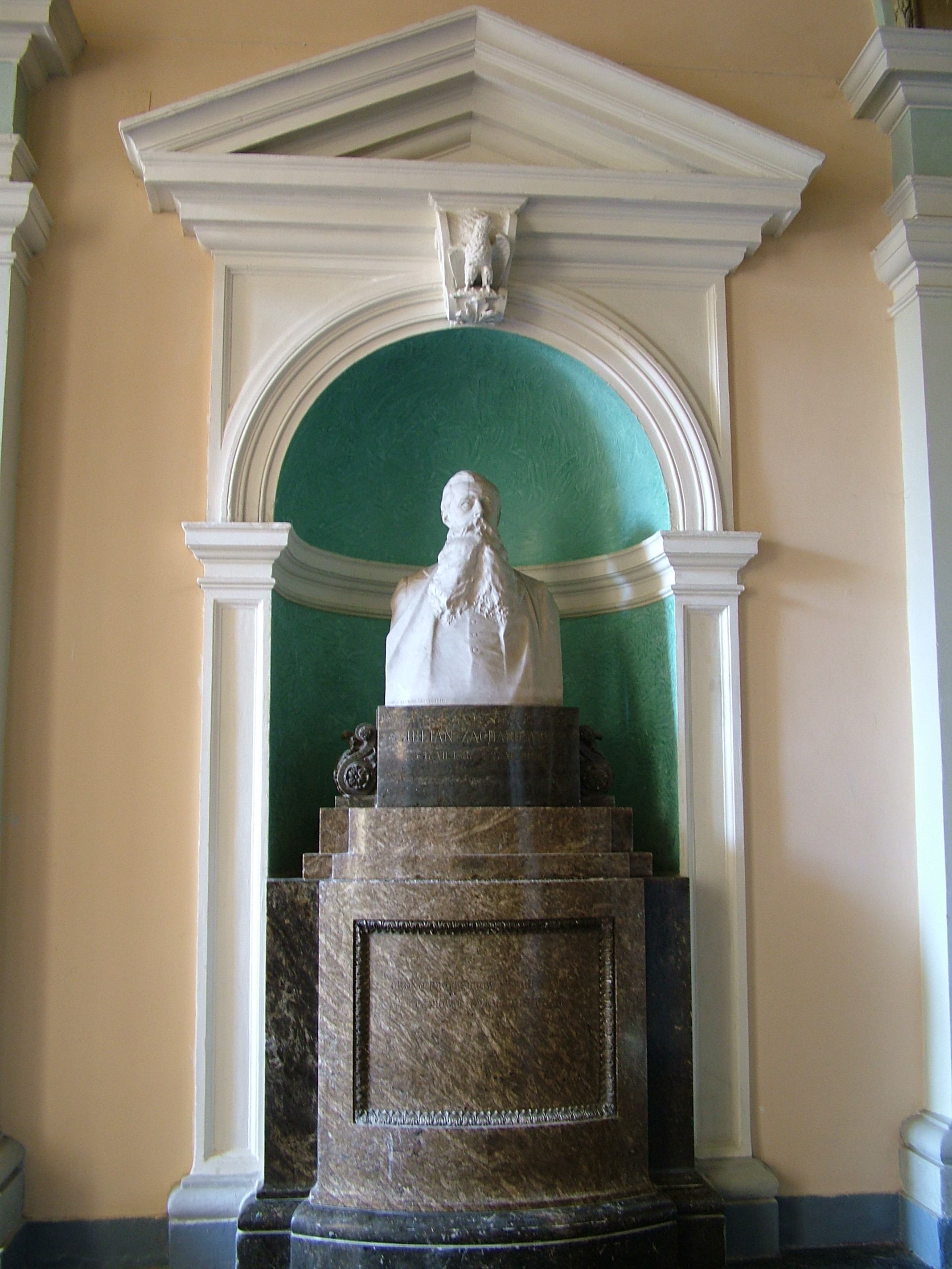 Popiersie Juliana Zachariewicza w westybulu gmachu głównego Politechniki Lwowskiej. Sierpień 2007. Fot. Stanisław Kosiedowski.